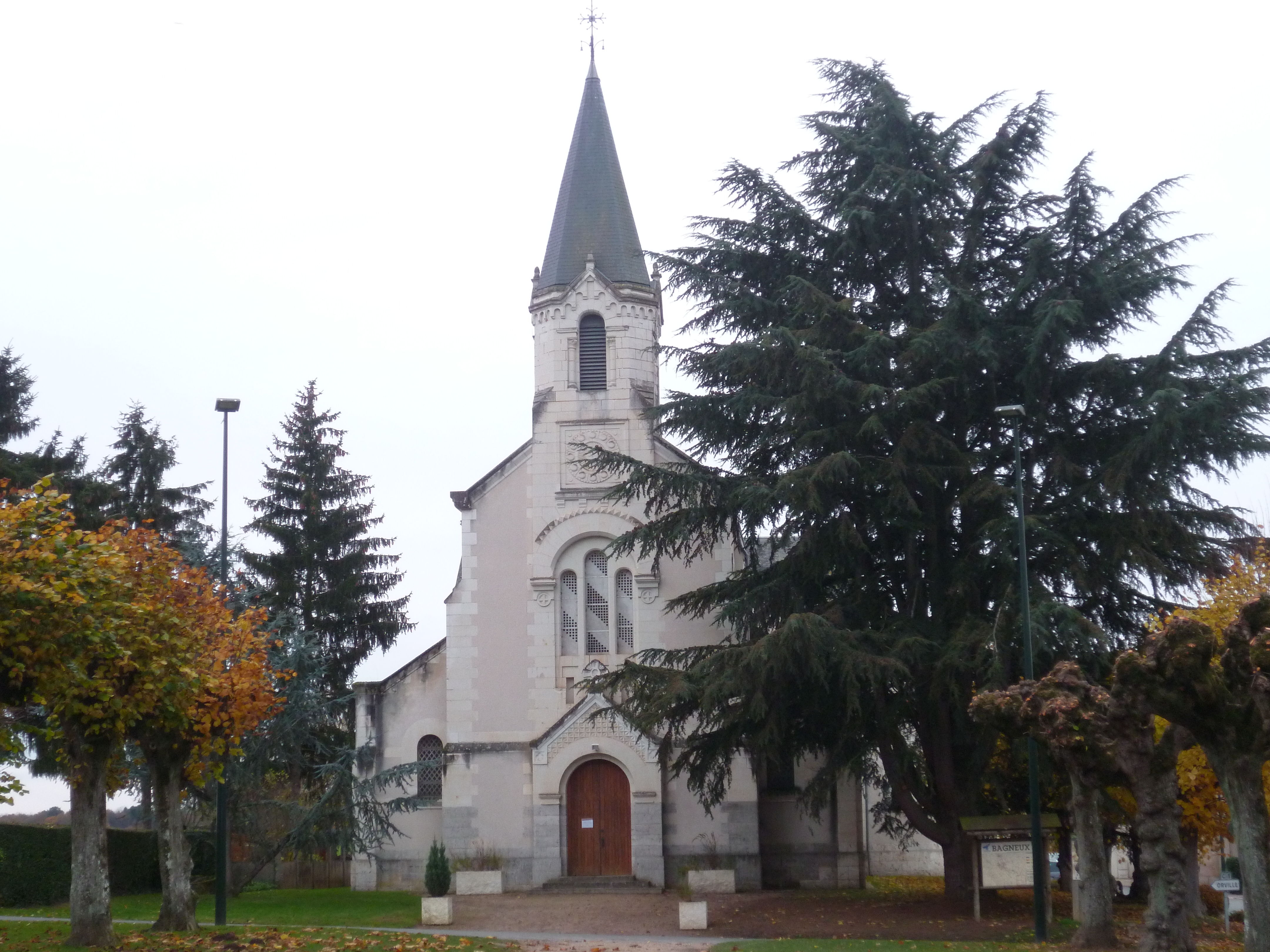 Eglise de Bagneux